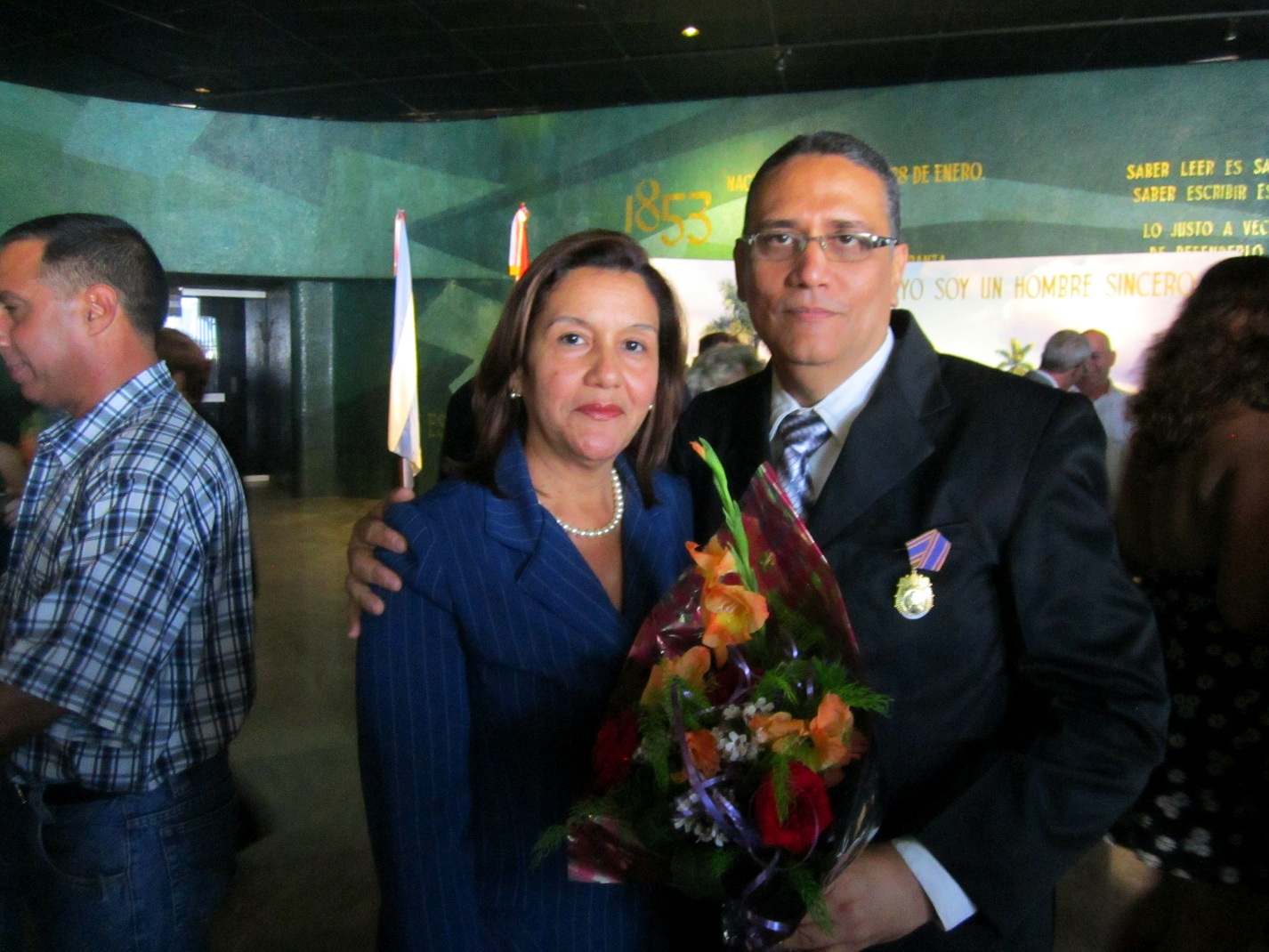 Ministra